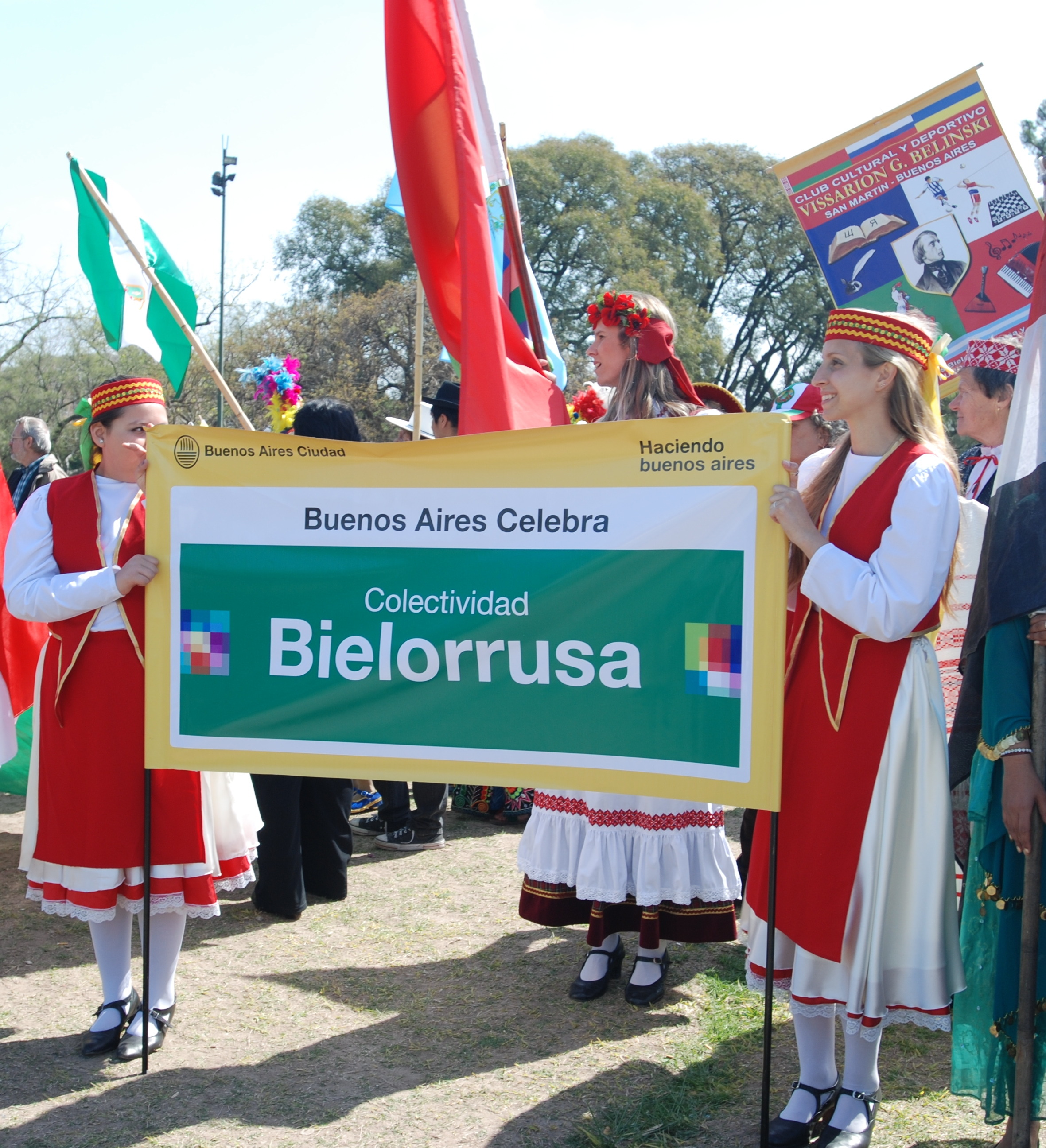 Colectividad Bielorrusa de Argentina durante festejo de colectividades extranjeras, en Buenos Aires.